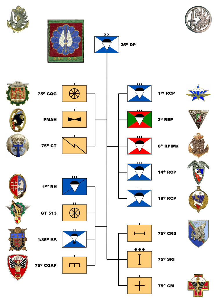 Organigramme, symbole Otan et insignes, de la 25e division parachutiste française le 1er avril 1960 (Cf. histoire des parachutistes français, éditions SPL, page 542.)